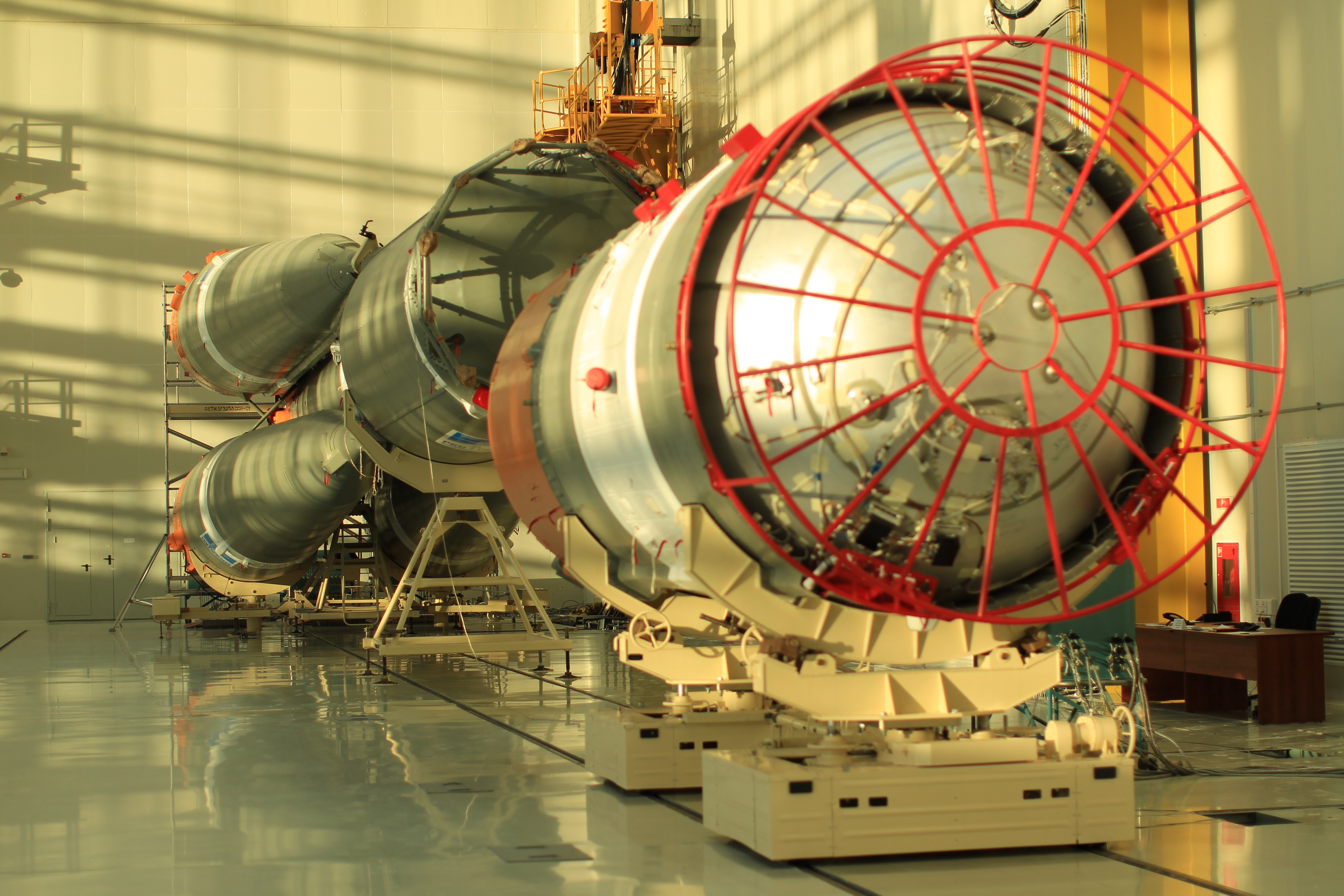 Сборка ракеты-носителя (РН) "Союз-2.1а", космодром "Восточный"